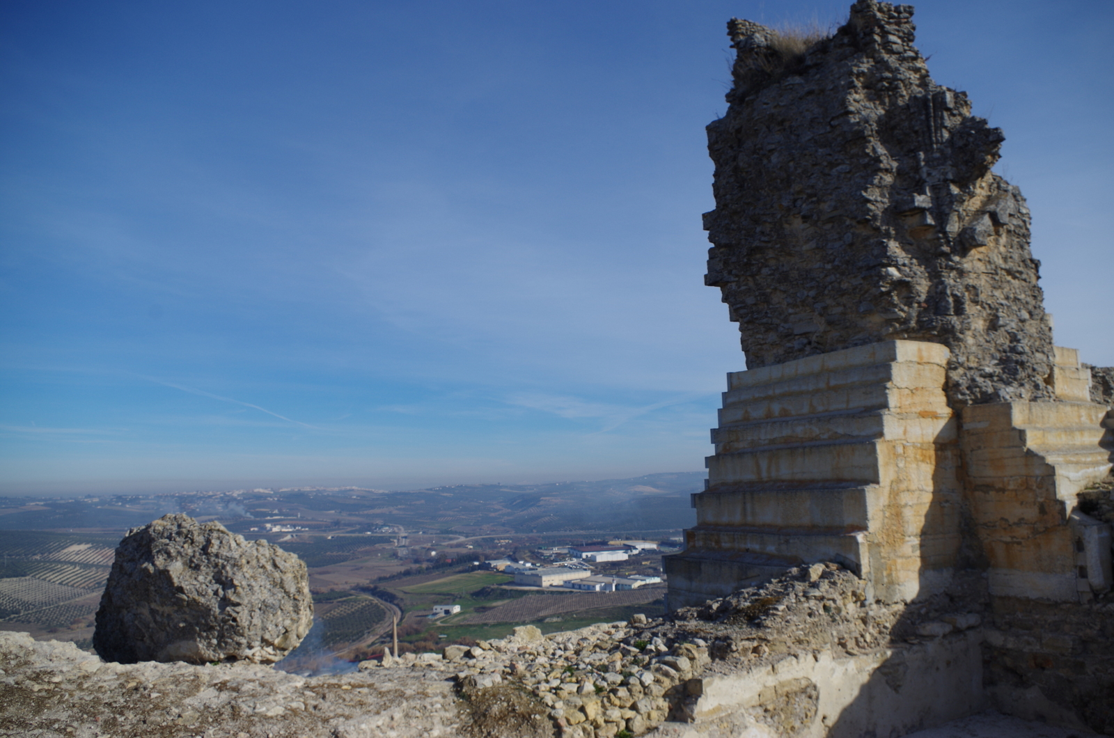 Aguilar de la Frontera (España).